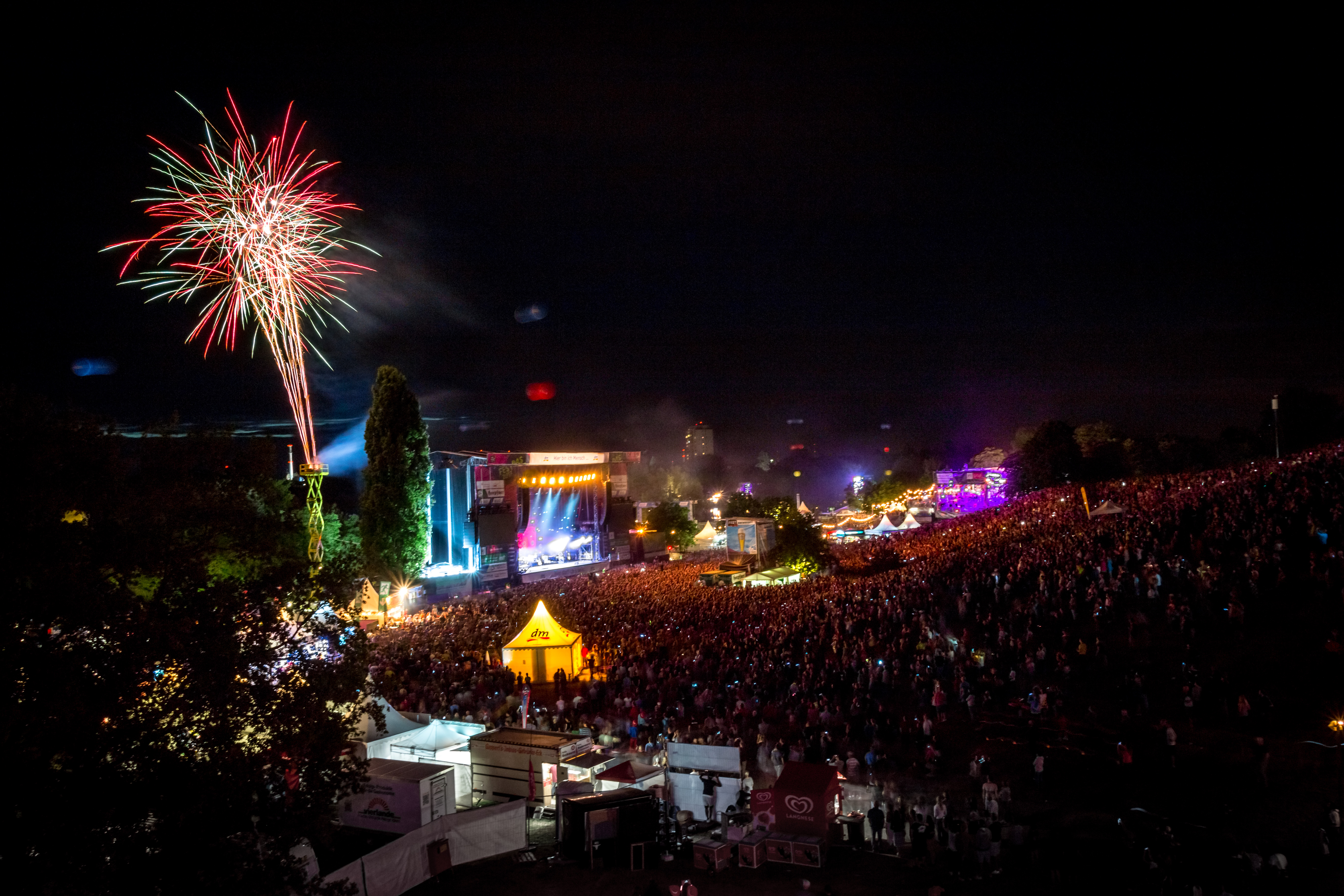 Erstmalig gab es 2017 ein Feuerwerk bei Das Fest.